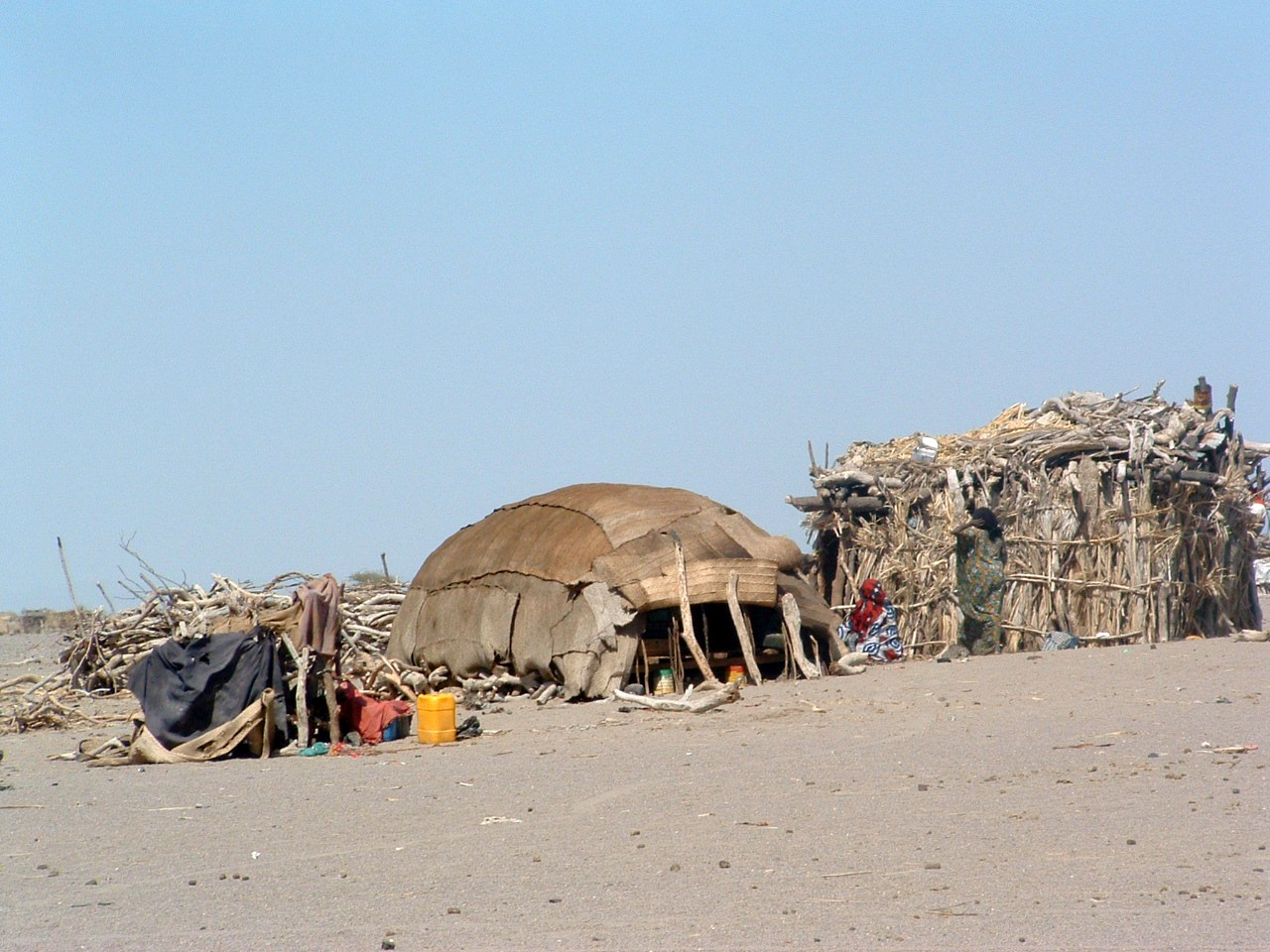 Photographie d'habitations afars sises aux abords du Lac Abbe, en République de Djibouti.